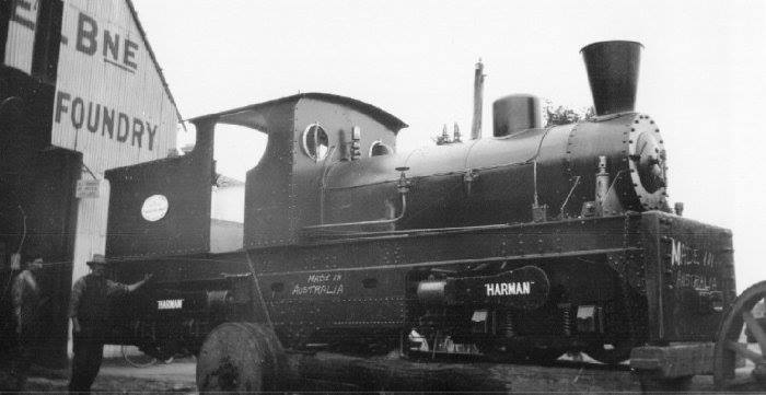 Harman geared locomotive built for the State Forestry Commission of Victoria in 1927